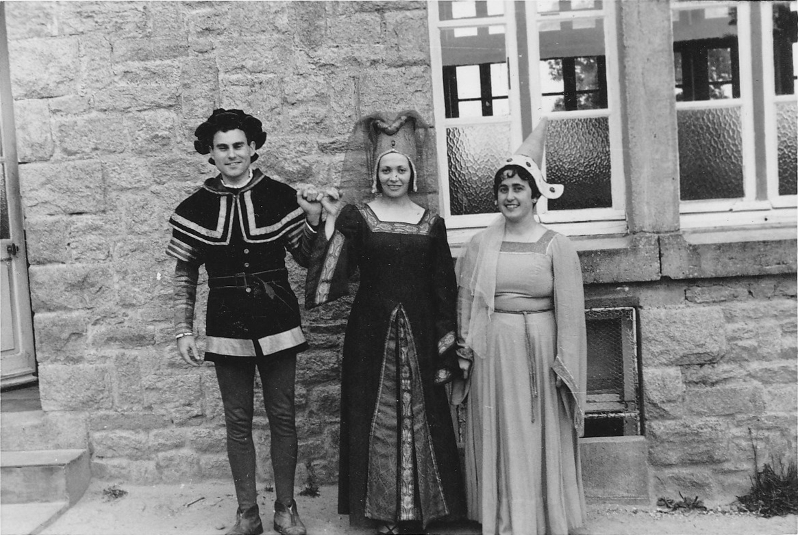 Pezh-c'hoari Roparz Hemon "An Intañvez Barv Glas" c'hoariet e Kamp Etrekeltiek ar Vrezhonegerien gant Yann Talbot, Gizella Etienne hag Ivona Konan.